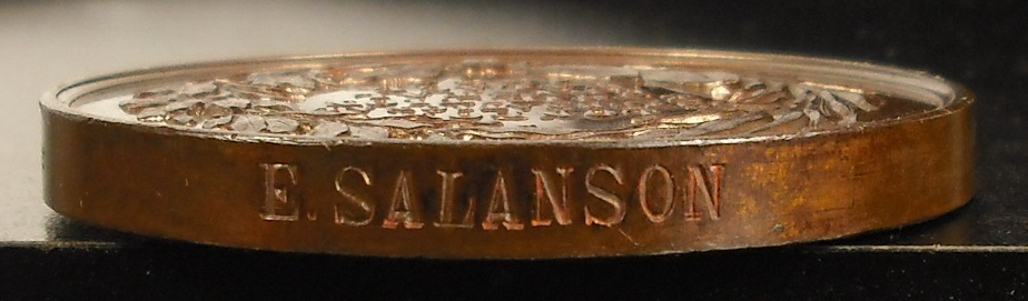 London international exhibition crystal palace 1884